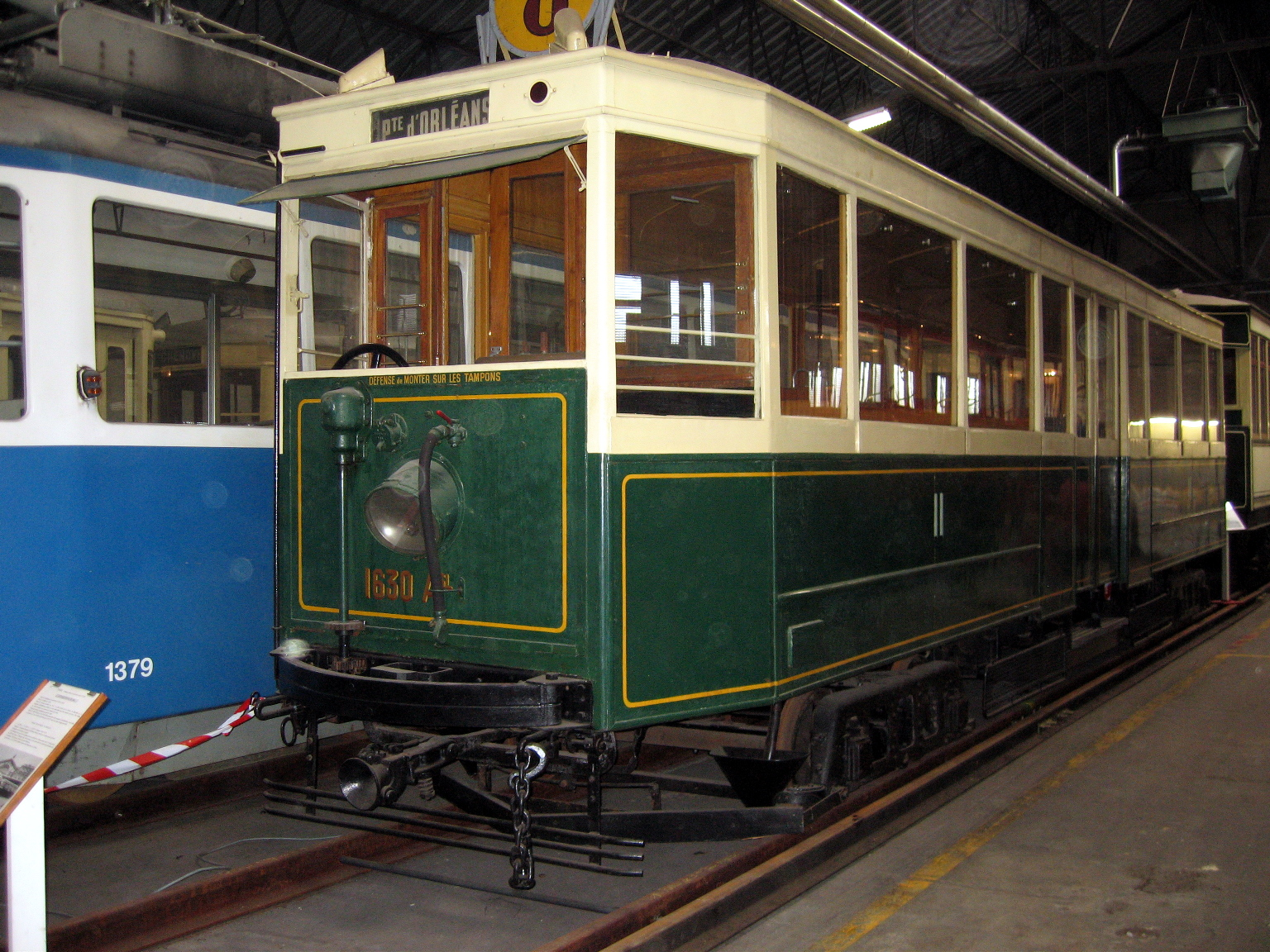 Tramway historique parisien STCRP à AMTUIR 15/09/2007.